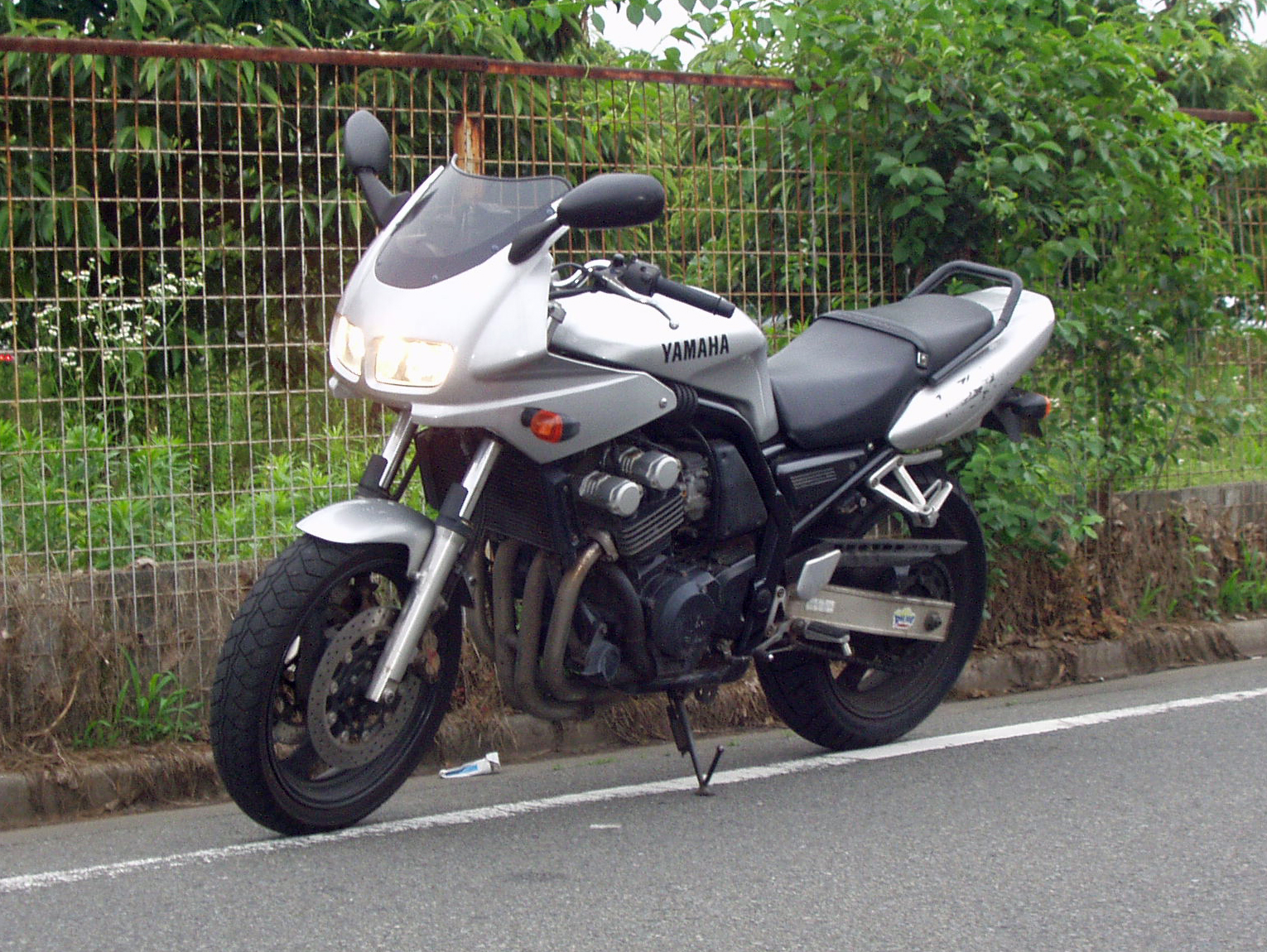 撮影者：GF8 category:オートバイ画像